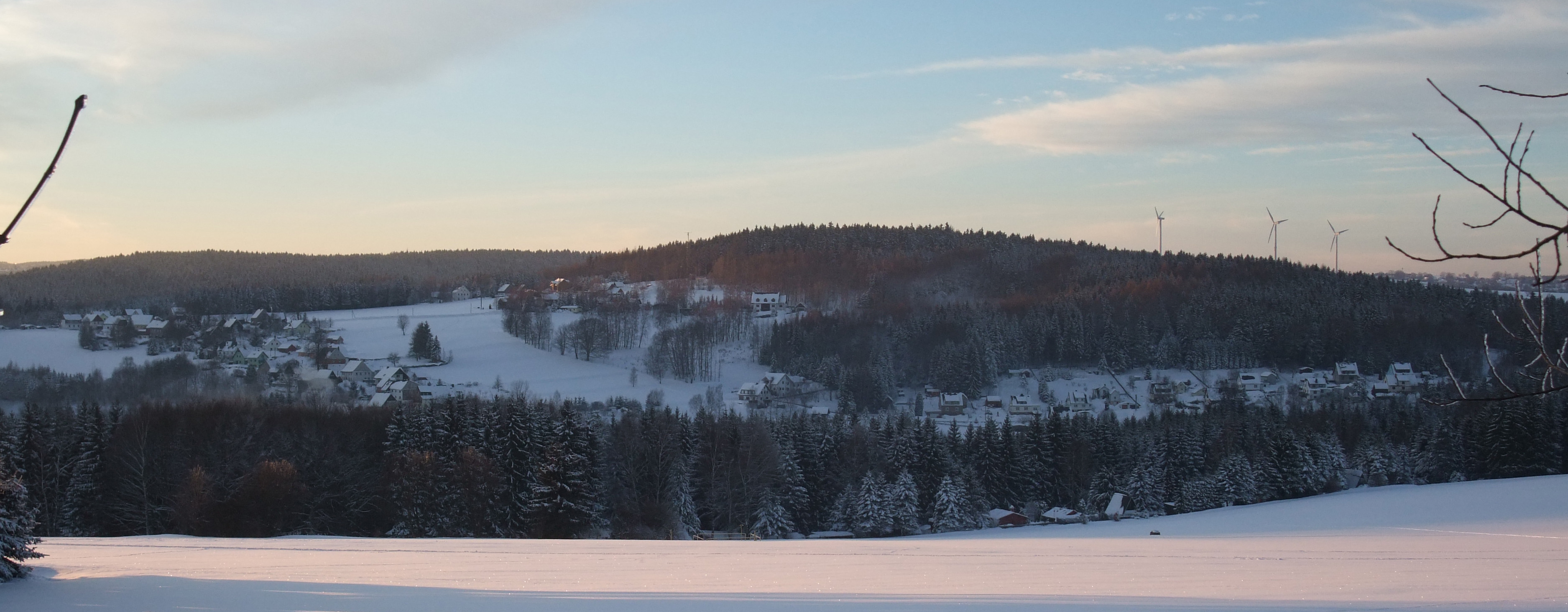 Rittersberg von Osten gesehen.